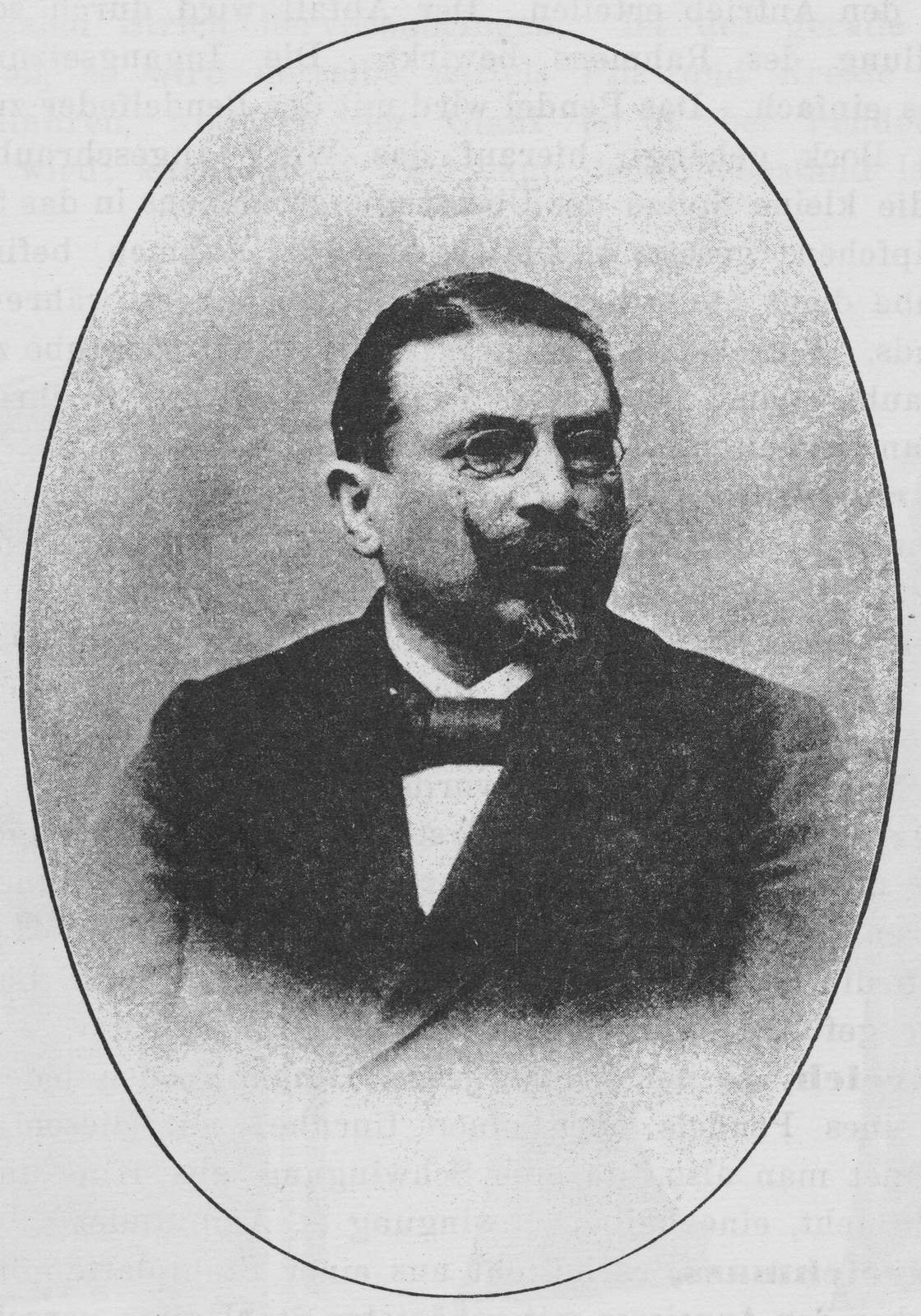 Ludwig Strasser (1853–1917), deutscher Uhrmacher